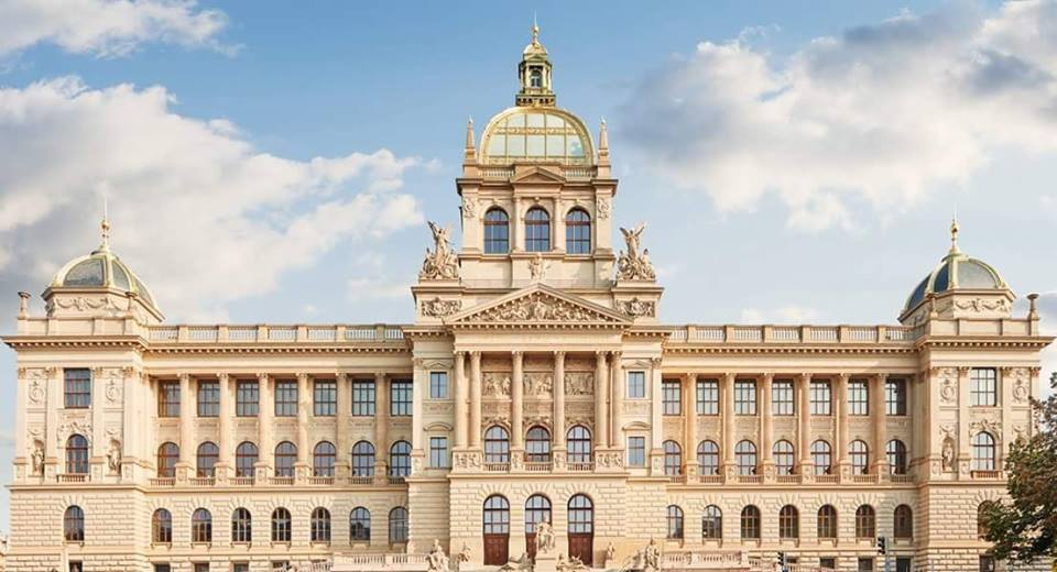 particolare della facciata restaurata